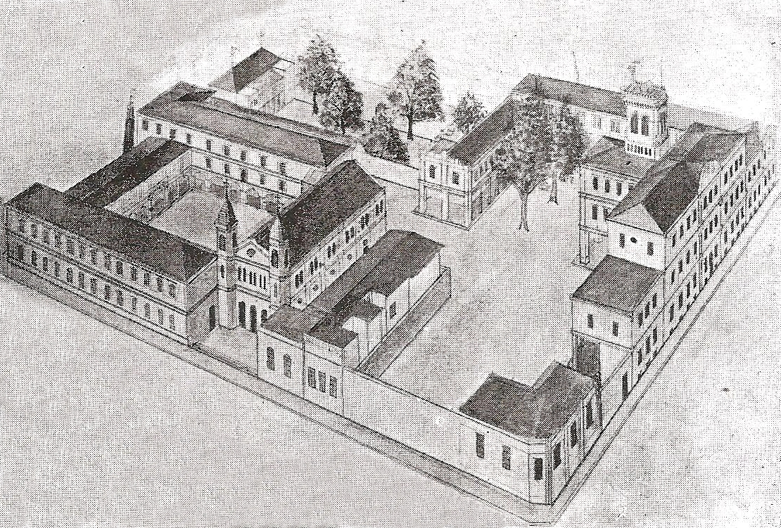 Anteproyecto salesiano con la Iglesia de San Carlos y la Escuela de Artes y Oficios - Fines siglo XIX